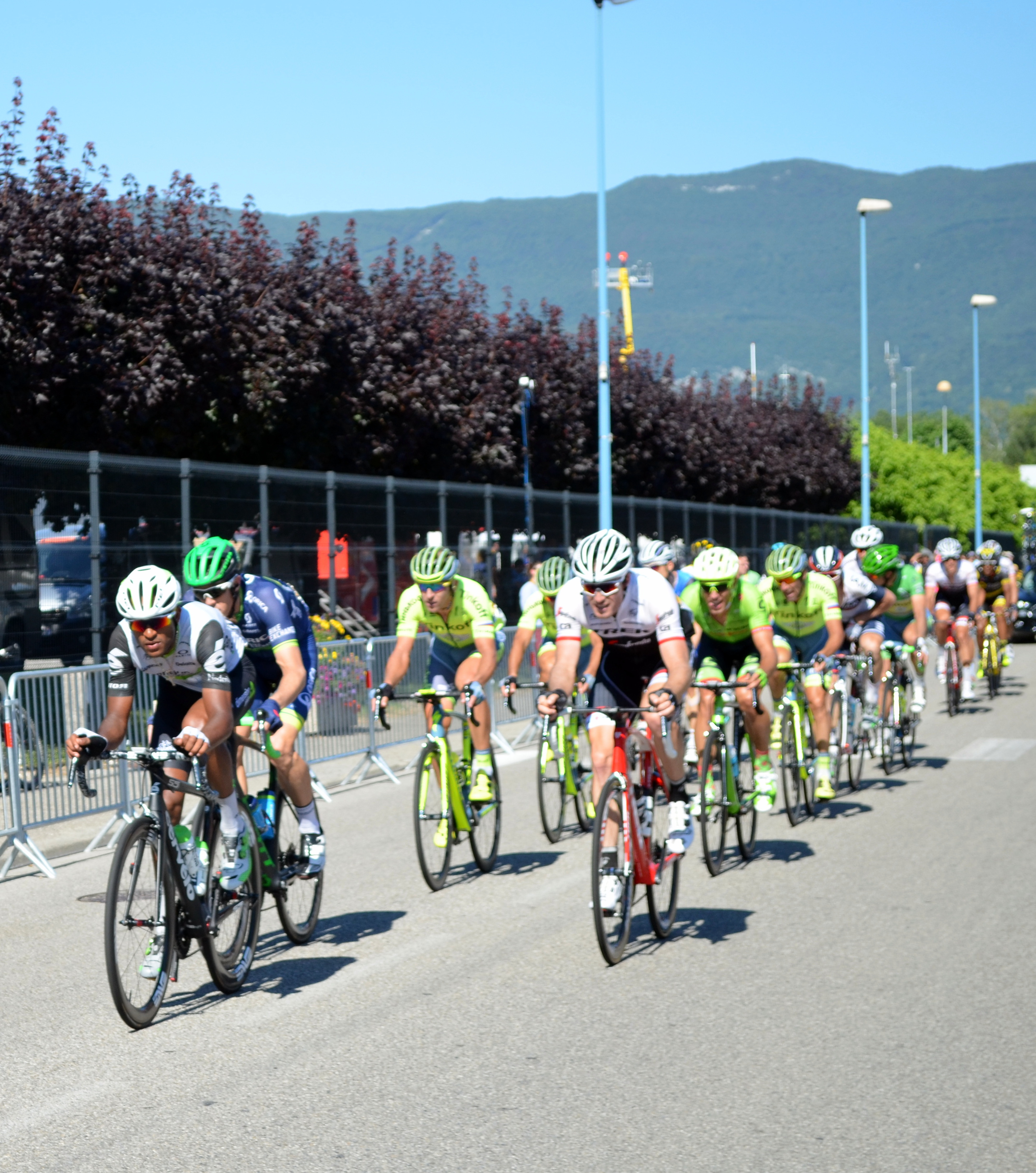 Arrivée de la 15e étape du Tour de France 2016 à Culoz. Préalablement le peloton faisait deux passages dans la ville avant l'ascension du Grand Colombier.